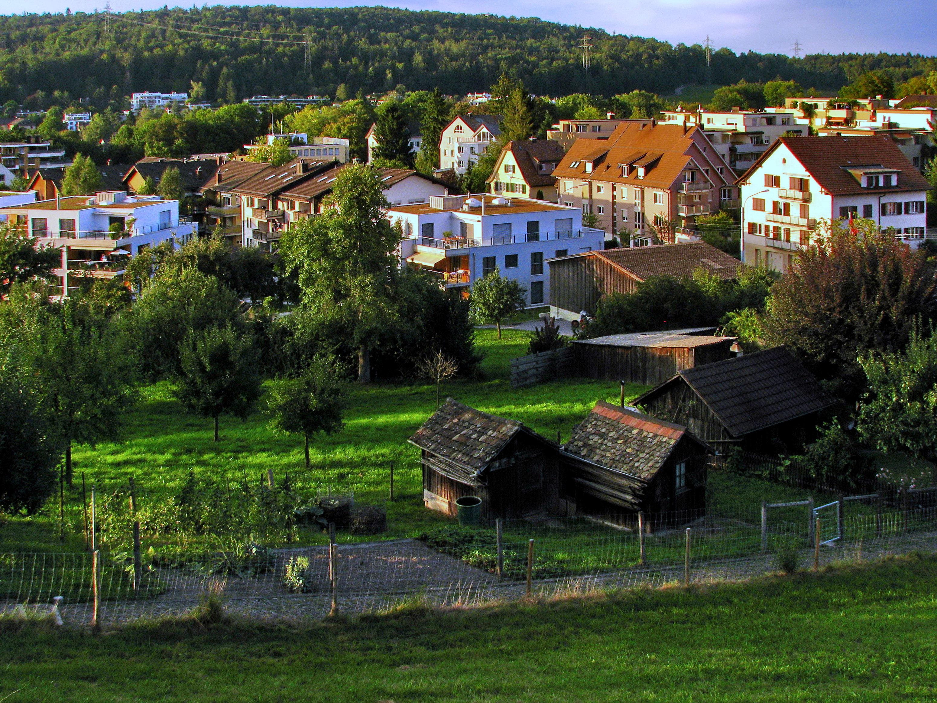 Zürich-Witikon as seen from Alte Kirche (Old church), Adlisberg in the background.